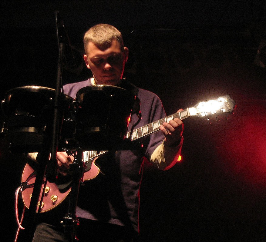 Adam Nowak w czasie koncertu "raz,dwa, trzy" w Nowej Soli, czerwiec 2004, autor:Mohylek